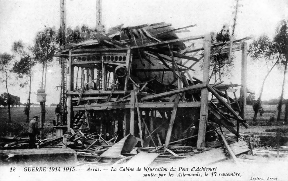 Le poste de bifurcation d'Achicourt après sa destruction par l'armée allemande le 17 septembre 1914.